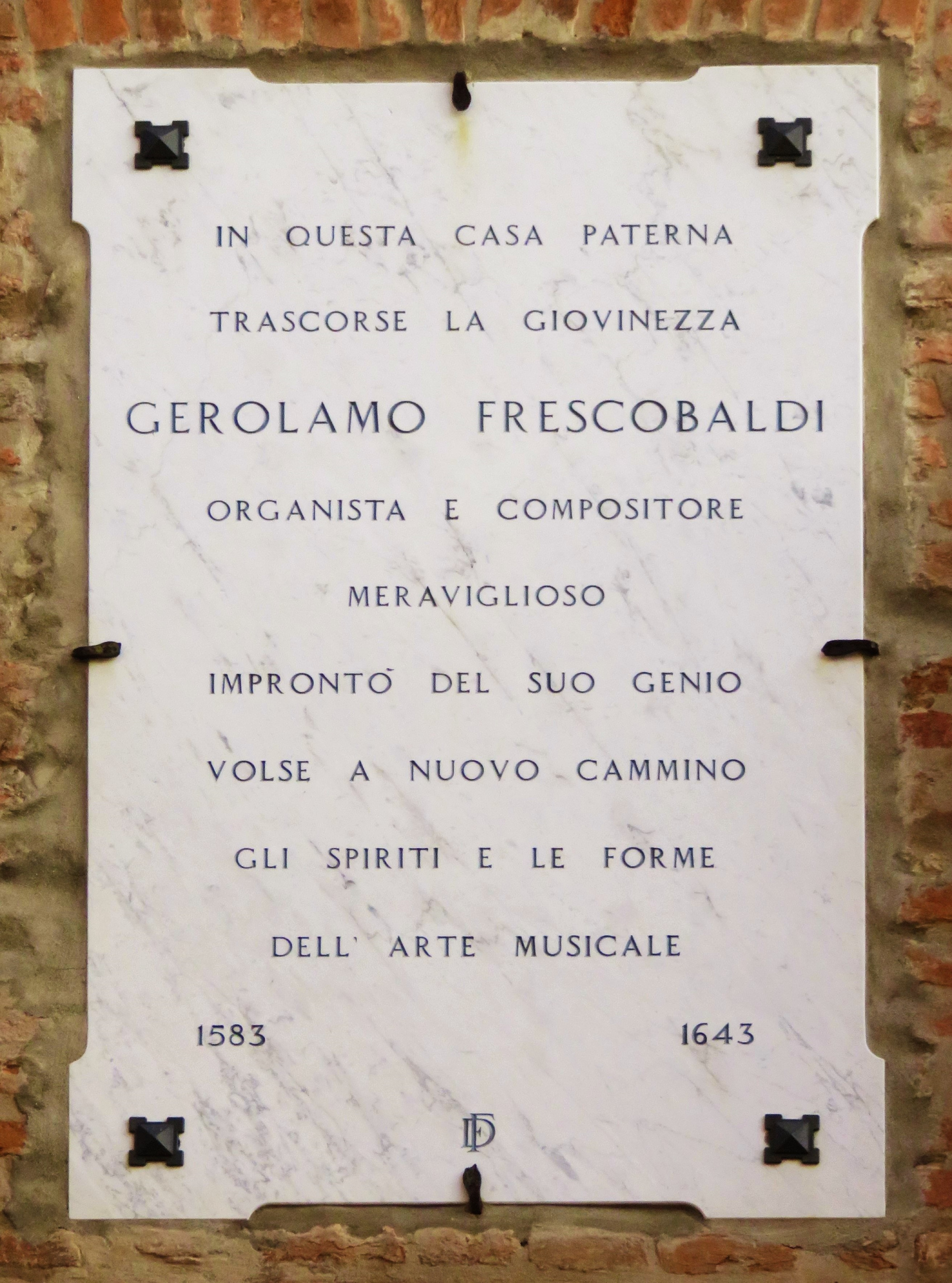 Epigrafe su casa Frescobaldi